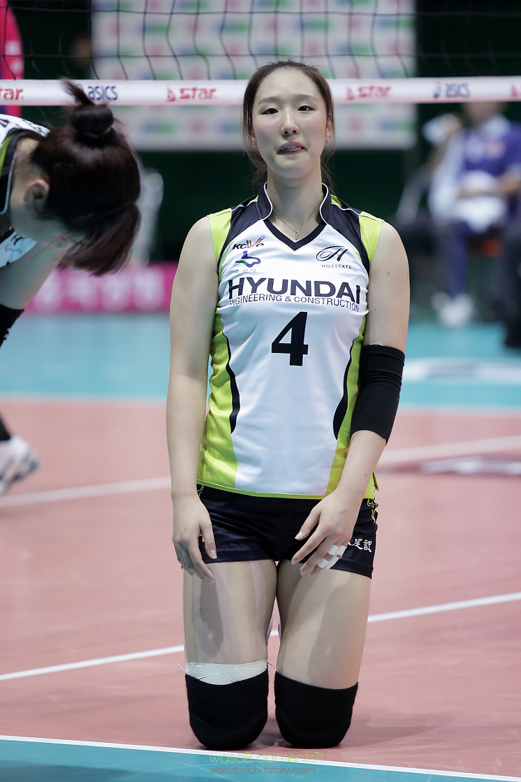 배구 선수 황연주